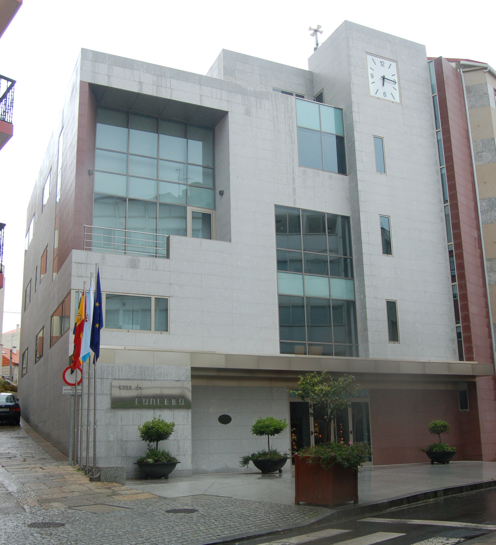 Casa del ayuntamiento de Sanxenxo, en Galicia.